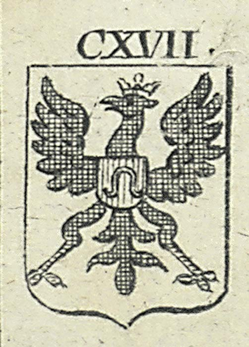 Aaken, Goslar und Isny : Wapen der Reichsstädte. - Kupferstich ; s/w ; 26 x 19 mm. - Original. Bildinschrift: CXVII. Beschr. aus Quelle: Das fünf und vierzigste Capitel. Von der Wapenkunst. [...] 8. Wapen der Reichsstädte. Fig. CXVII. Aaken, Goslar und Isny. (S. 415) Rechte/Sperrvermerk: Bibliothek für Bildungsgeschichtliche Forschung (DIPF) Angaben zur Digitalisierung: Signatur Scanvorlage: AD 908,04 ; CD 170 ; RF 479 Scanvorlage, Qualität: Original Zitierfähige URL